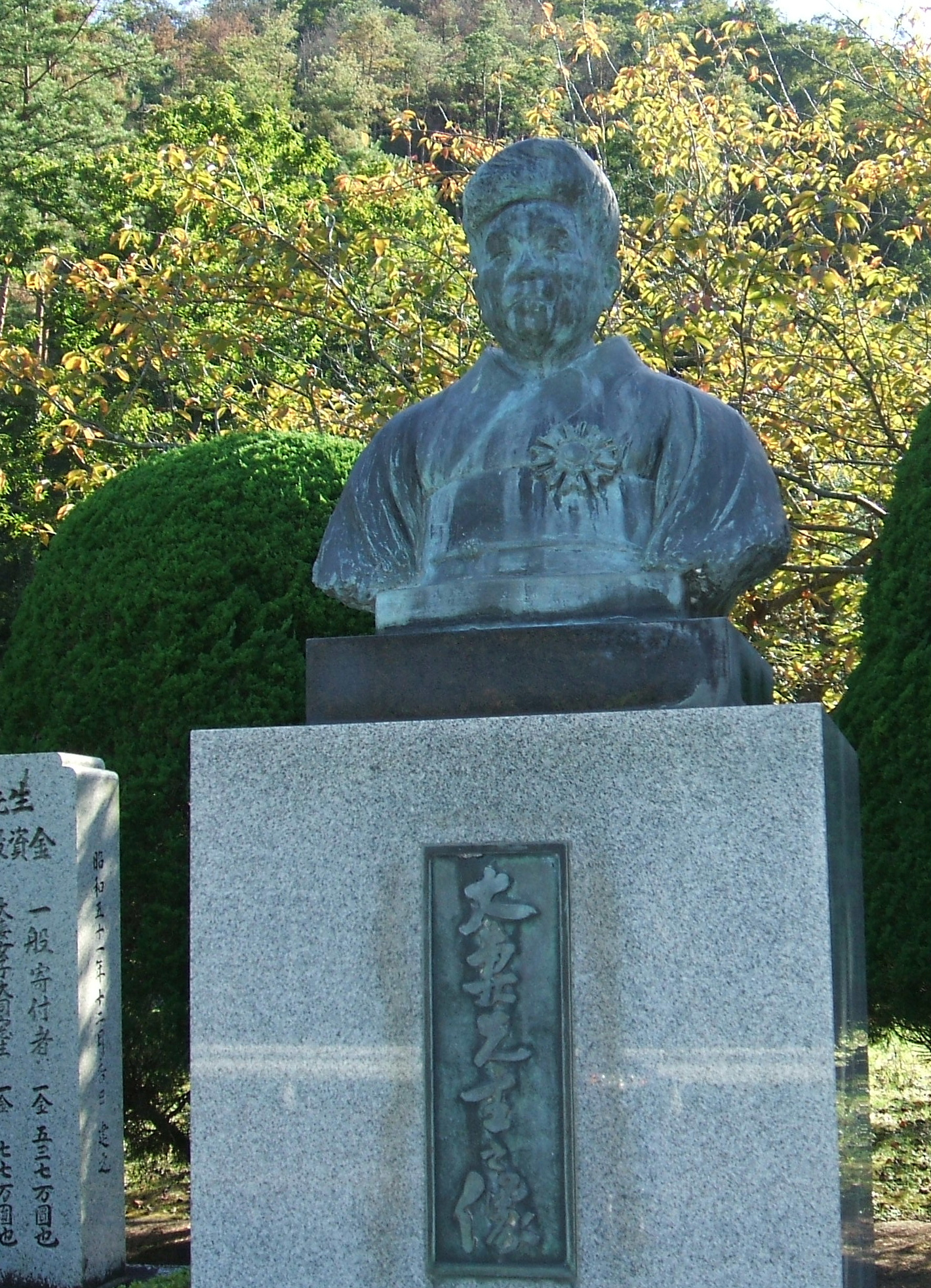 日本人教育者大妻ユタカの銅像